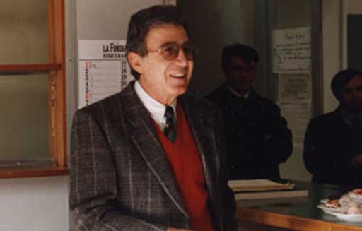 Francesco Marcone sorride a un collega fuori dall'inquadratura